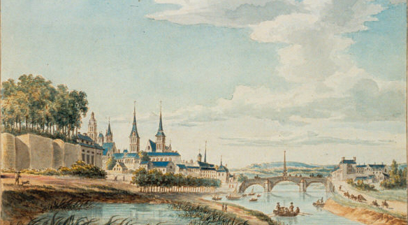 Compiègne abbaye Saint-Corneille Picardie Famille Mottet